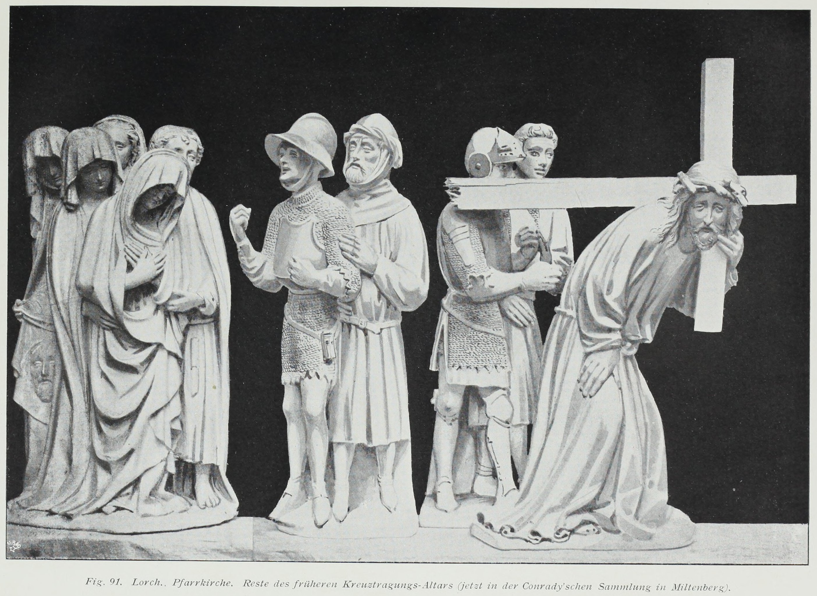 Lorch Pfarrkirche Reste des früheren Kreuztragungs-Altars (jetzt in der Conradyschen Sammlung in Miltenberg)